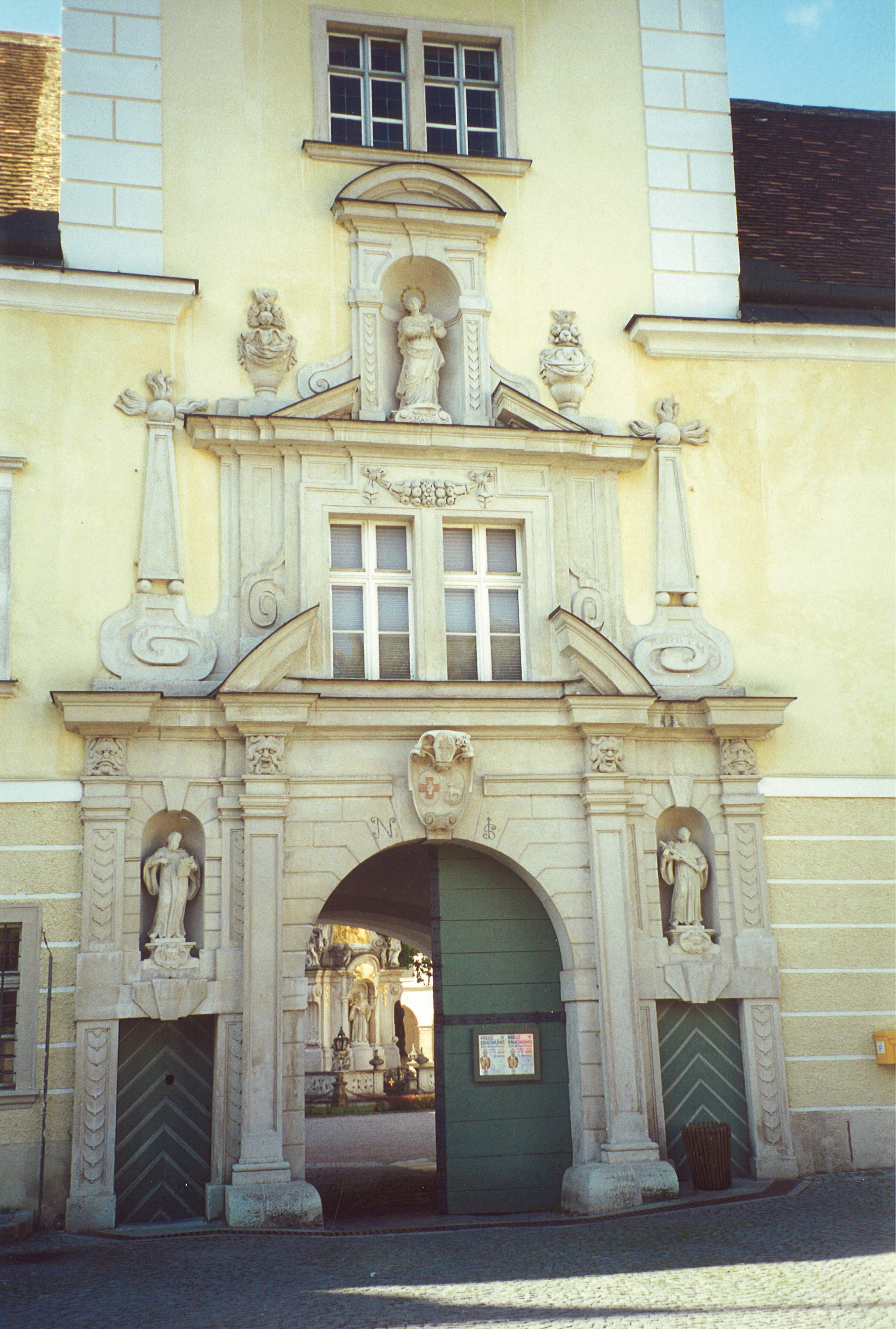 Hauptportal des Stiftes Heiligenkreuz das in den inneren Klosterhof führt, errichtet vor 1678.